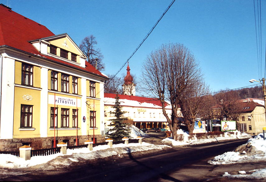 Petrovice u Chabařovic (Peterswald): zentraler Ortsteil mit Gemeindeverwaltung (v.l.), Dorfplatz und Kirche